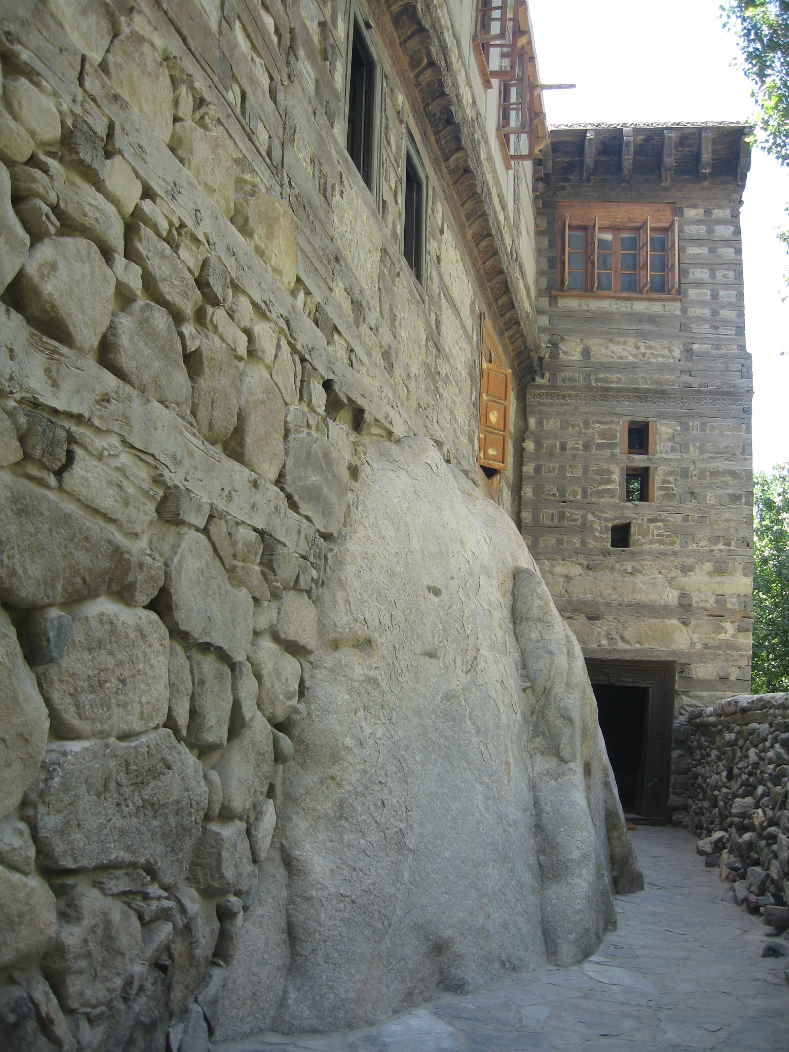 Shigar fort in Shigar near Skardu, Baltistan, Pakistan